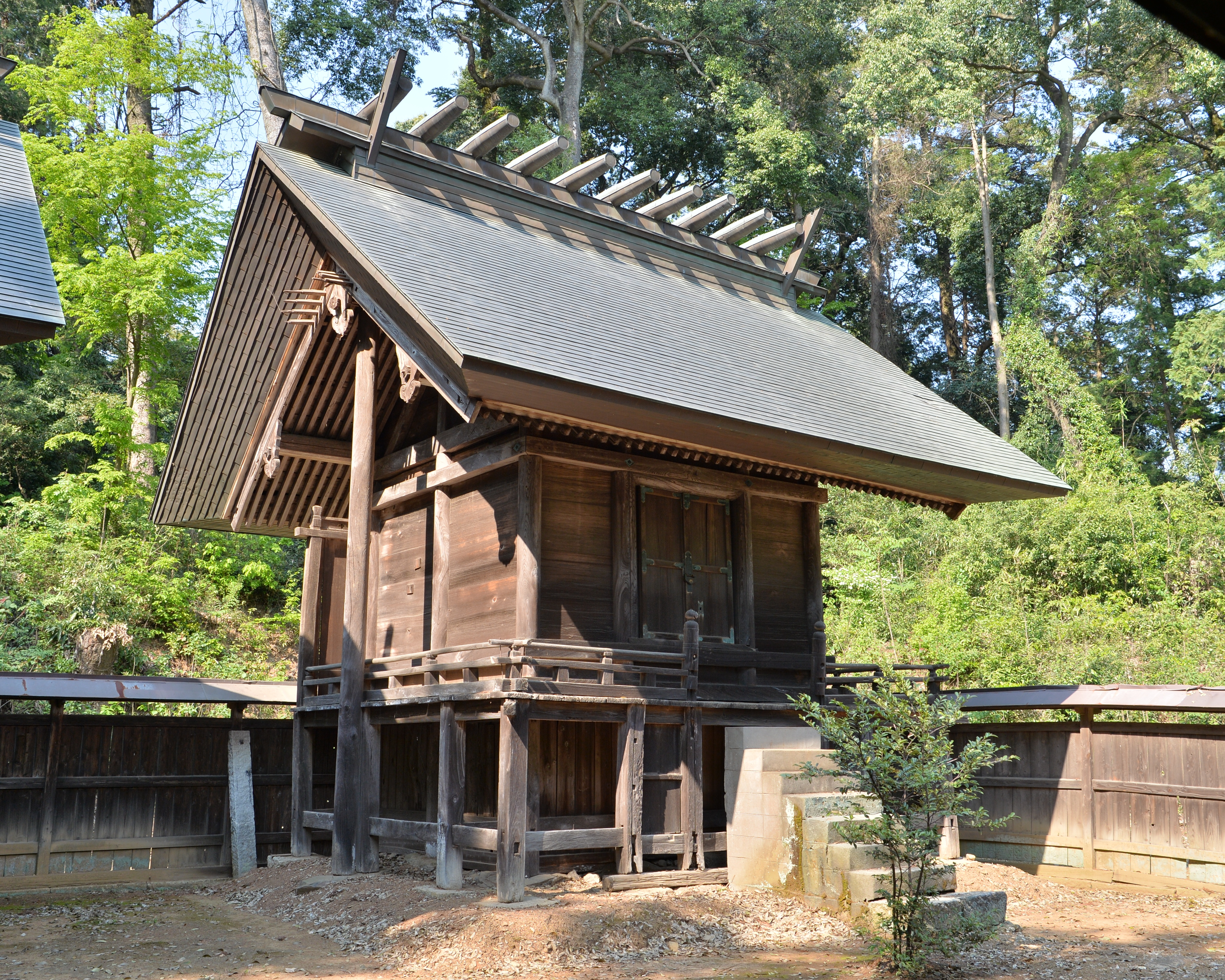 内外大神宮の本殿は右側に内宮本殿・天照大神を祀る。国の重要文化財。延宝7年（1679年）建立。